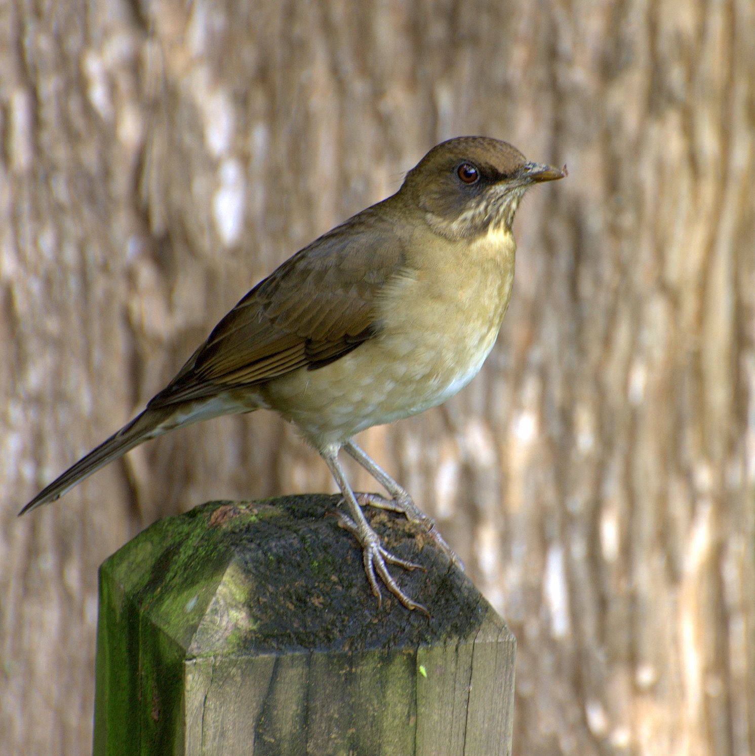 Turdus amaurochalinus, Horto Florestal de São Paulo